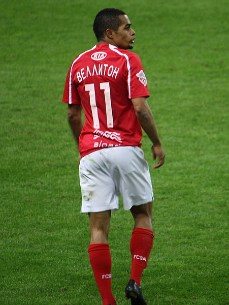 Welliton